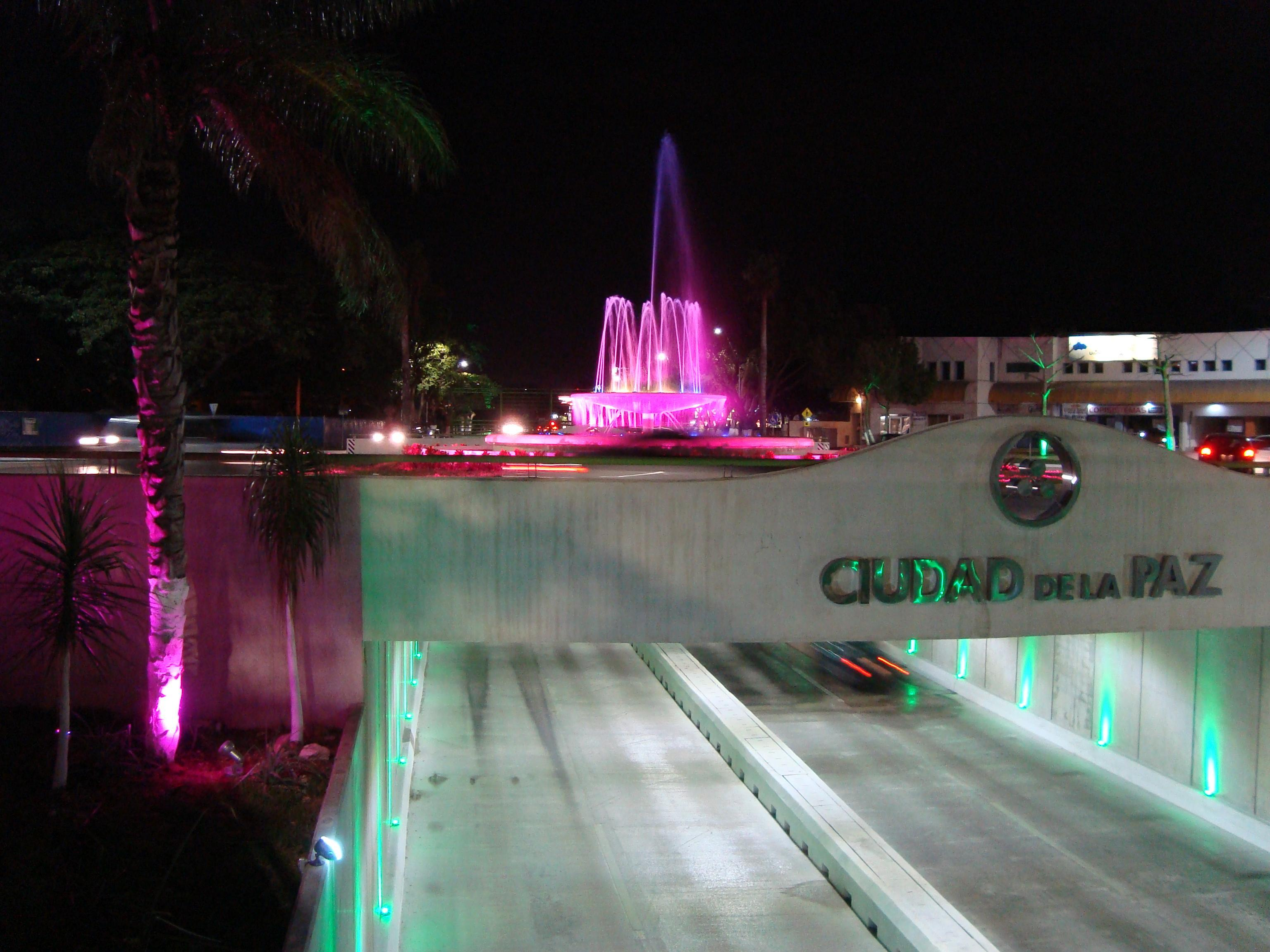 Glorieta de la Paz en Prolongacion Montejo. Merida, Yucatan.